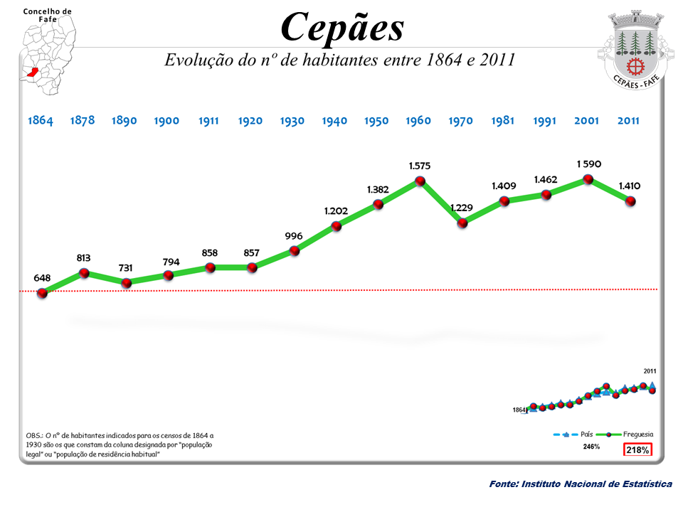 Censos 1864/2011